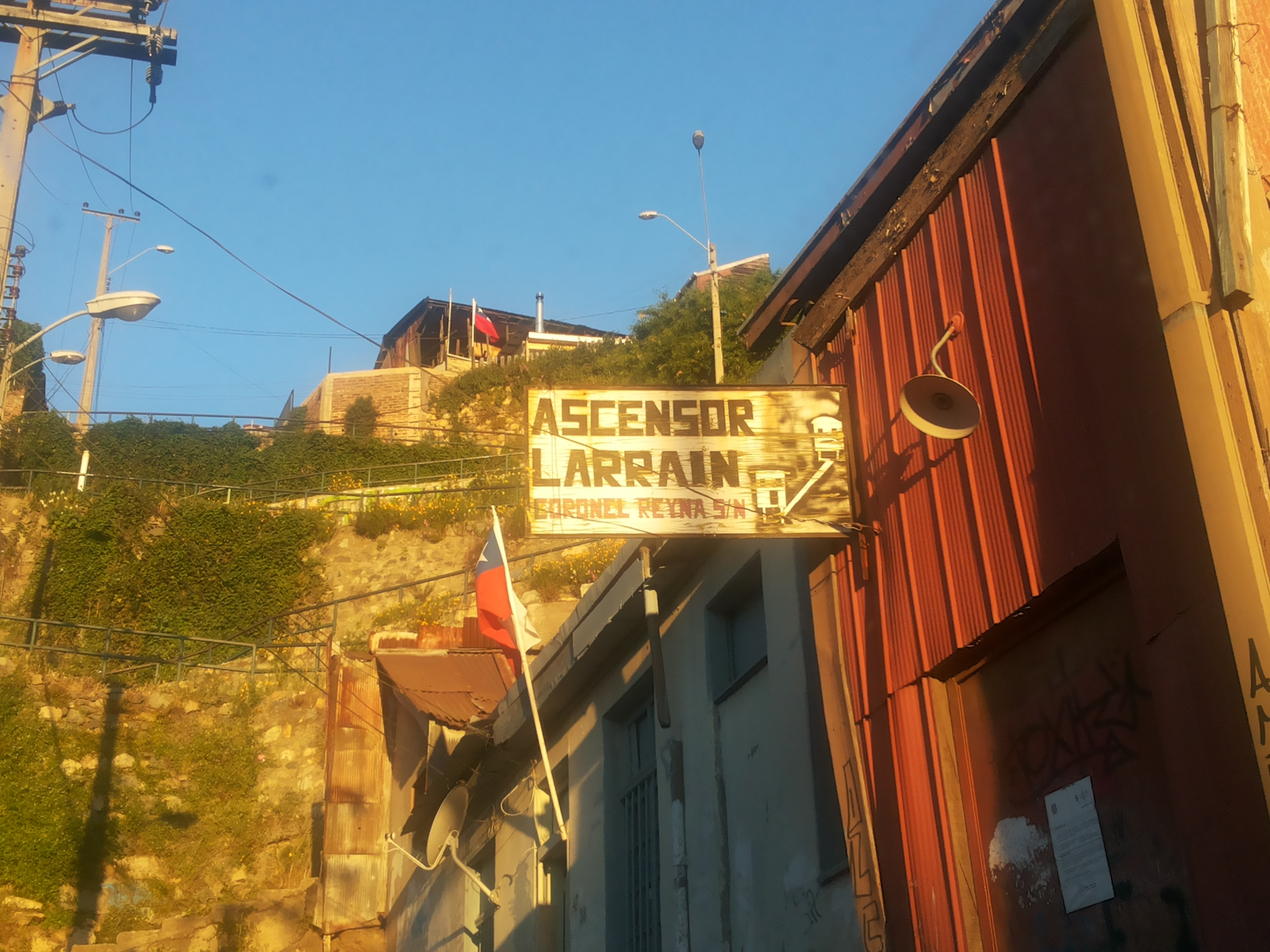 Ascensor Larraín This is a photo of a national monument in Chile: 776